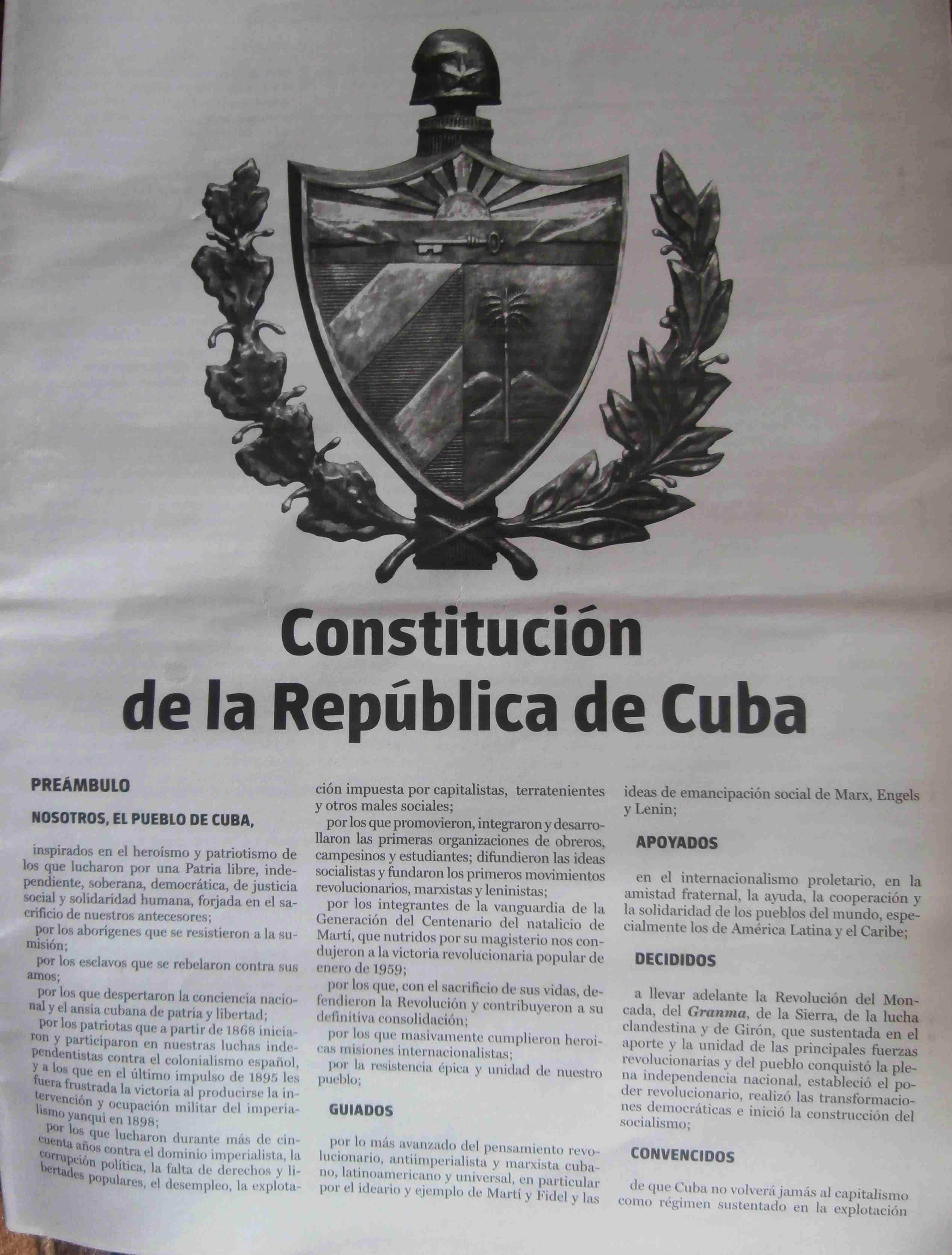 Página °1 de la constitutión de la república de Cuba